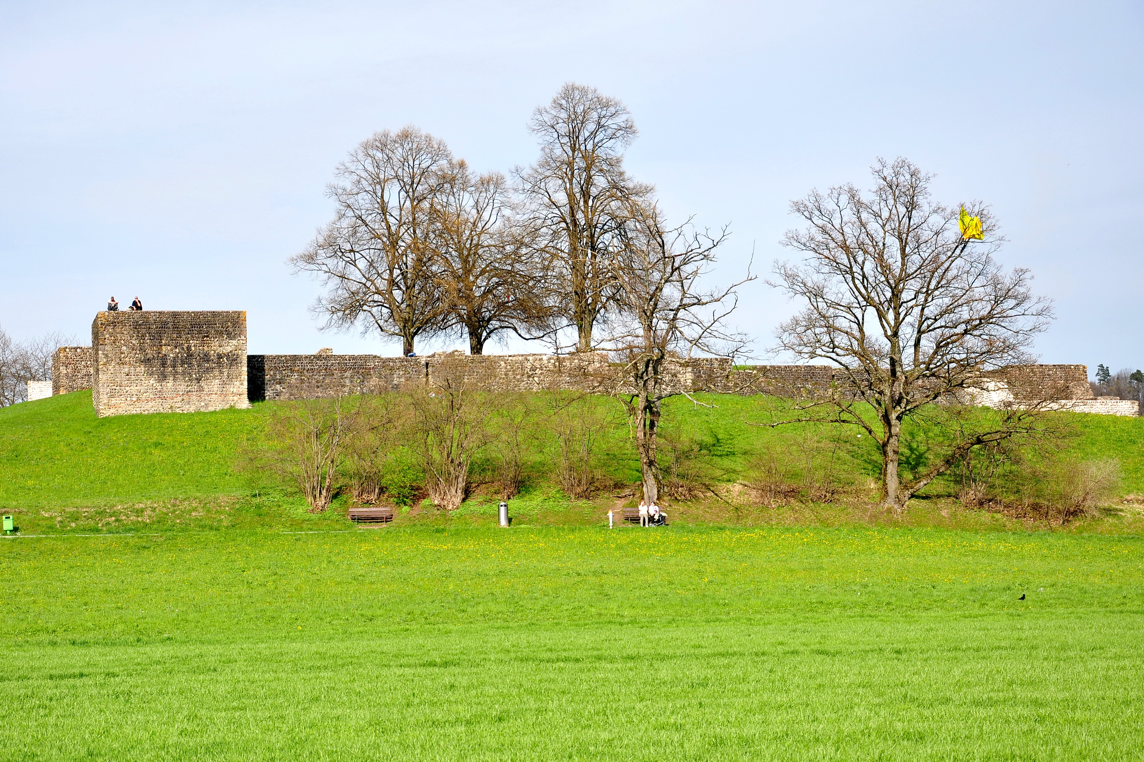 Castrum in Irgenhausen (Switzerland) as seen from towards Pfäffikersee (Lake Pfäffikon)